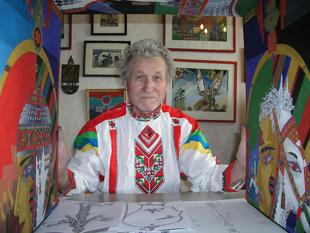 чувашский художник, живописец-монументалист